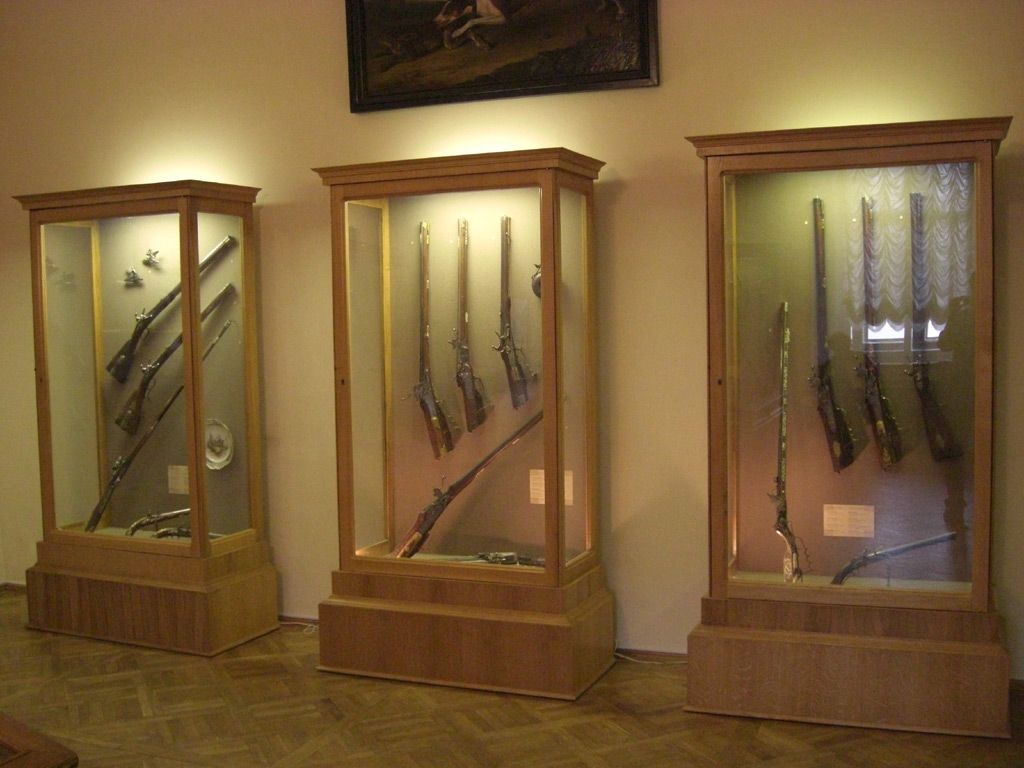 Выставка оружия в Большом Гатчинском дворце